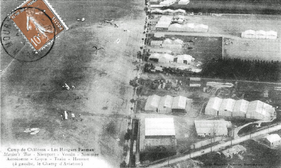 Au camp de Châlons, les hangars d'aviation à Mourmelon : Farman Nieuport Voisin Sommer Train Copin Antoinette.